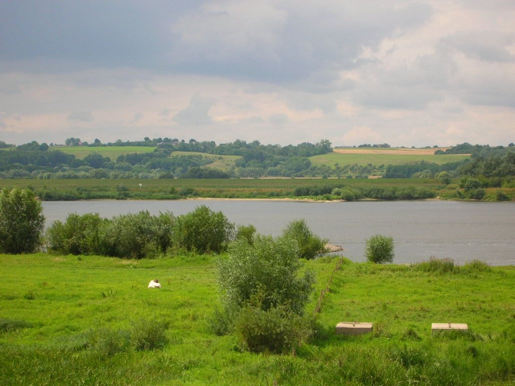 Dolina Dolnej Wisły między Bydgoszczą, a Chełmnem